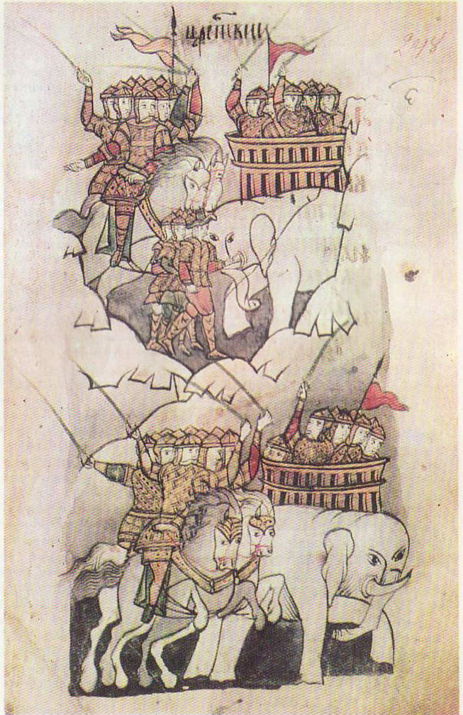 Сражение с Пором. Миниатюра из древнерусского романа "Александрия". (ГИМ, собр. Забелина, №8/827)